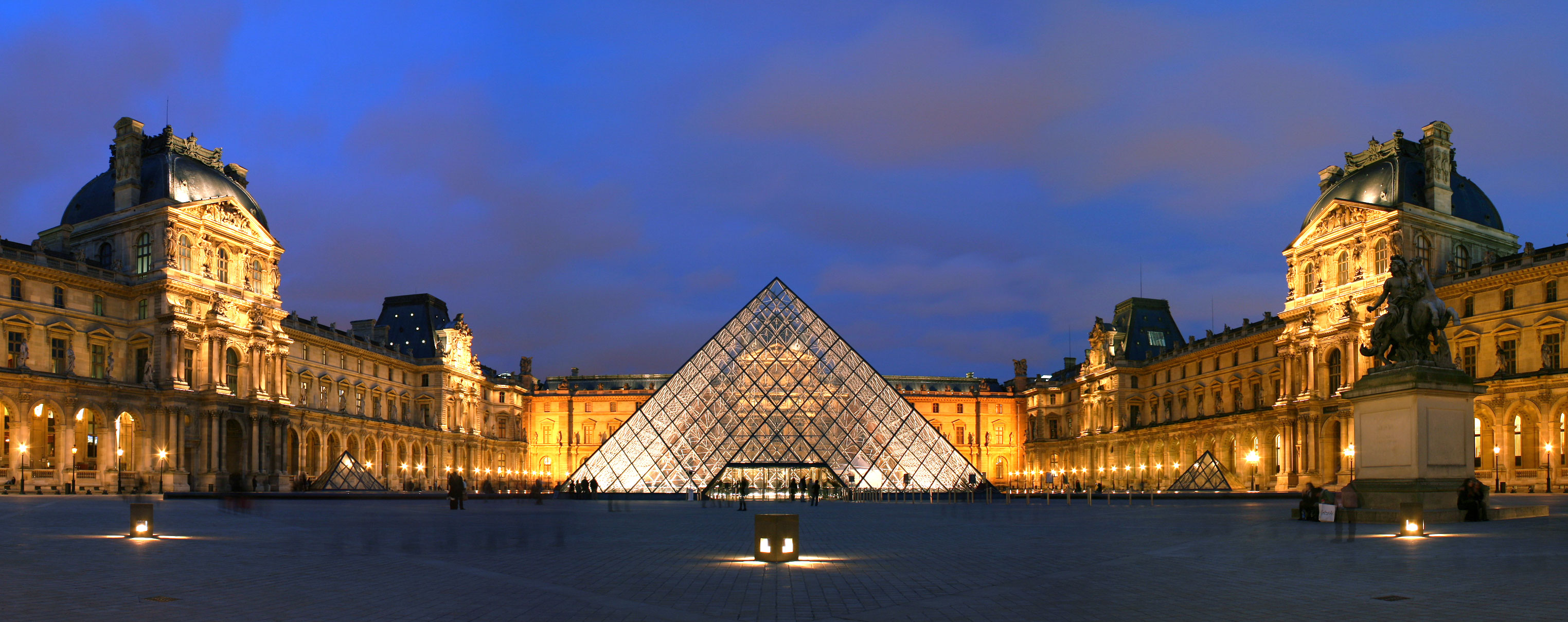 La pyramide du Louvre, au coucher de soleil. Ce panorama est constitué de trois photos collées ensemble avec Hugin.